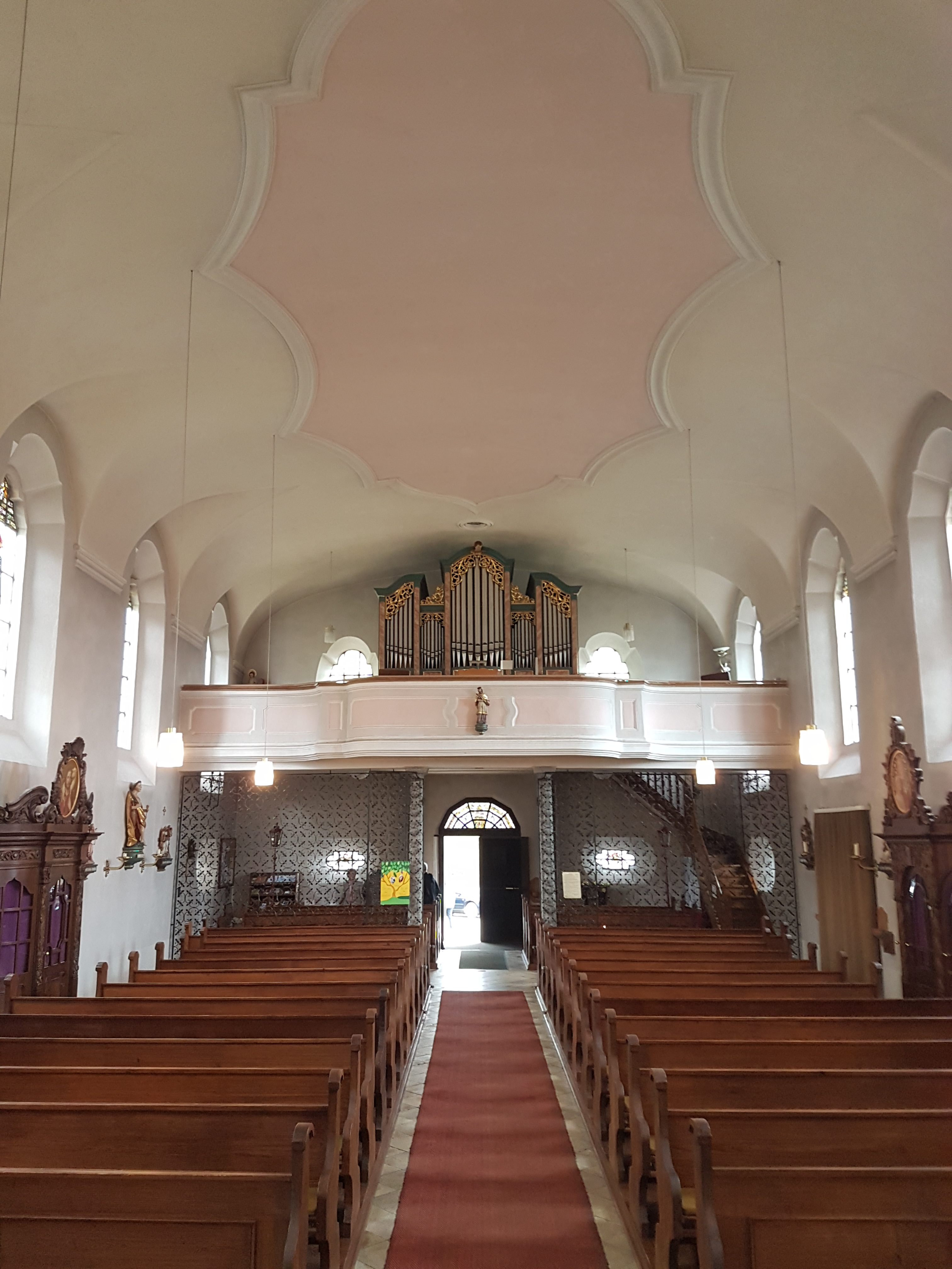 Orgel Wilchenreuth